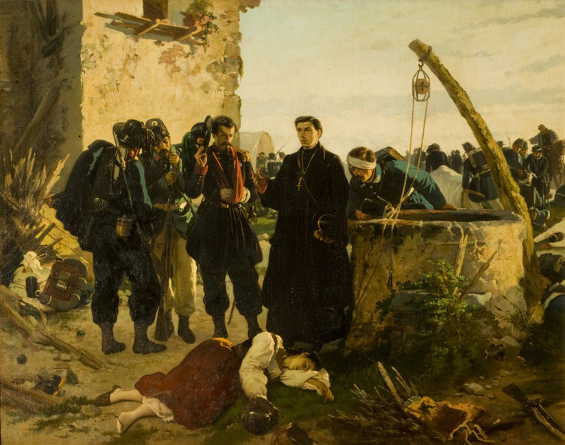 Luigi Ademollo: Anna Cuminiello trovata morto il giorno dopo la battaglia di san martino 1861